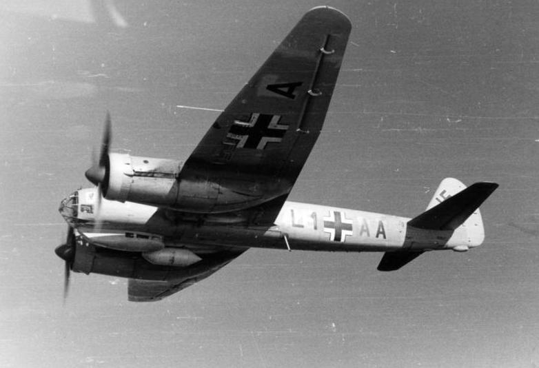 25.9.1941 Bildfolge: Ein Oberbürgermeister fliegt an die Front. Oberbürgermeister, Kreisleiter Dr. Rickel besucht das Lehrgeschwader 1, das seine Friedensgarnison in Greifswald hat, bei seinem Einsatz in Griechenland und Afrika. Rückflug von Afrika. In dichtem Verbandsflug geht es dem europäischen Kontinent zu. Ju 88, die Beherrscherin des östlichen Mittelmeeres! Die Ju 88 des Geschwaderkommodore [Major Friedrich Karl Knust] auf dem Rückflug von Afrika